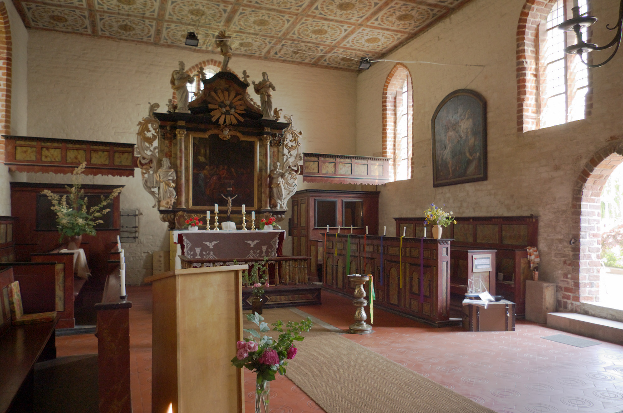 St. Nikolai-Kirche Altefähr, Rügen. Blick auf Chor und Altar